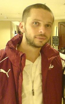 Vladimir Božović